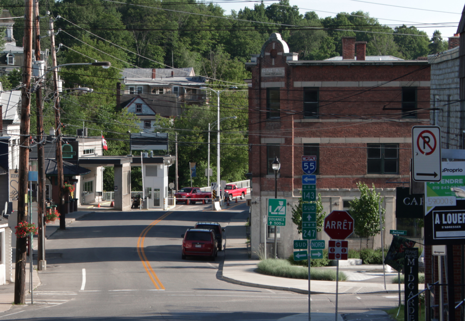 Frontière canado-américaine dans le village de Stanstead, Québec